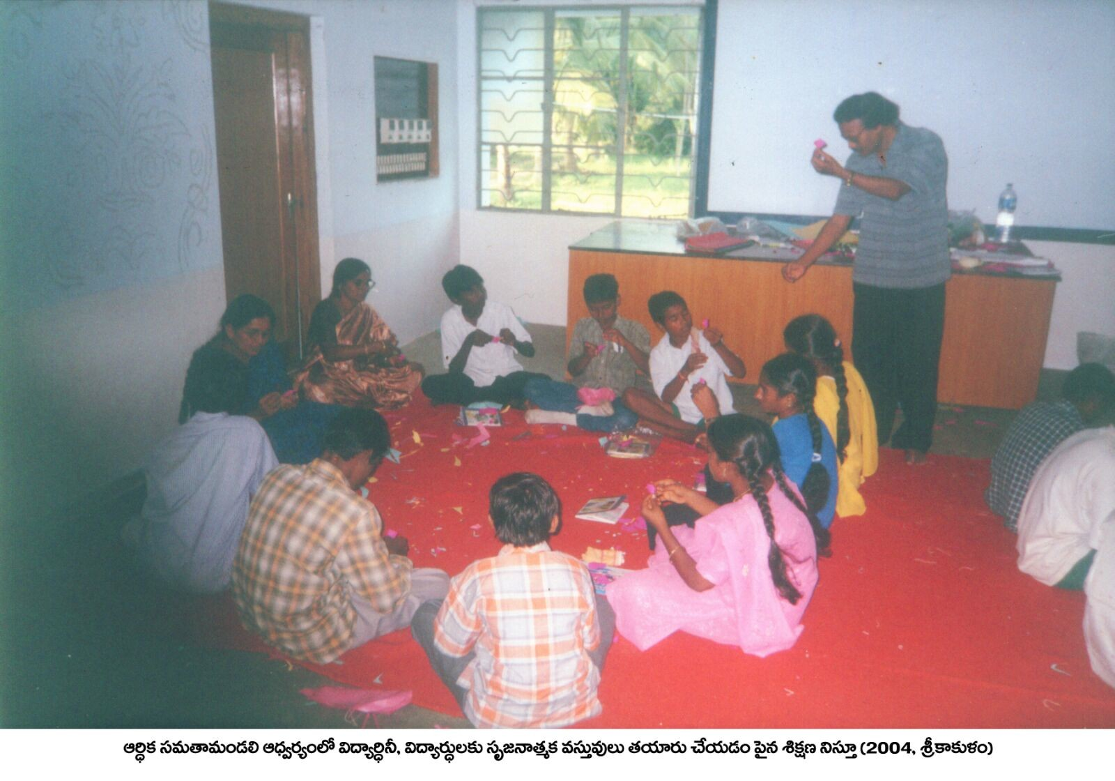 ఆర్థిక సమతామండలి అధ్వర్యంలో విద్యార్థులకు సృజనాత్మక వస్తువుల తయారీలో శిక్షణ యిస్తున్న సందర్భంలో (2004-శ్రీకాకుళం)